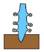 Glifo Náhuatl del municipio de Atitalaquia, Hidalgo